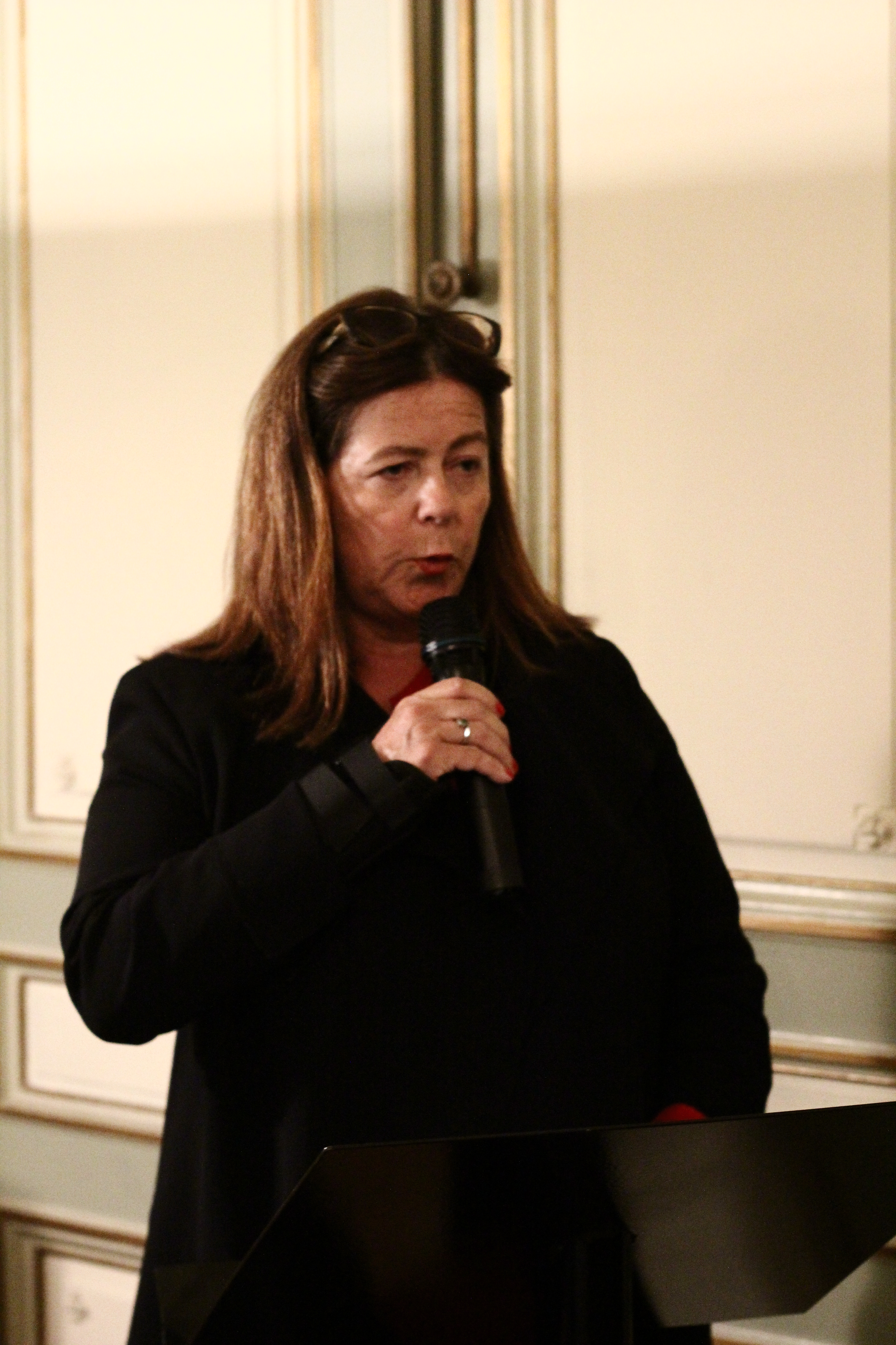 Bureau International de l'édition française (BIEF)